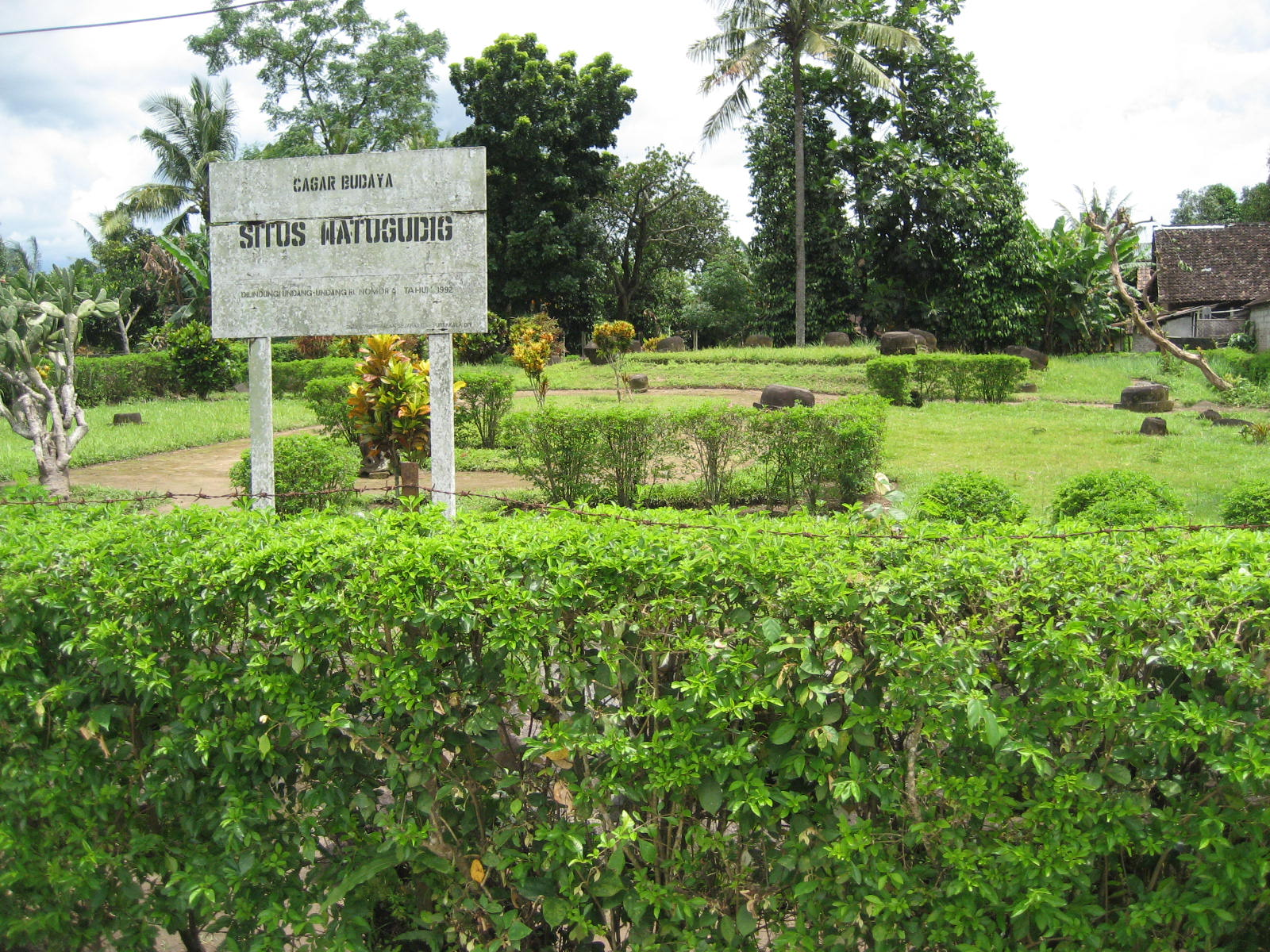 Watugudig temple ruin in central Java, Yogyakarta